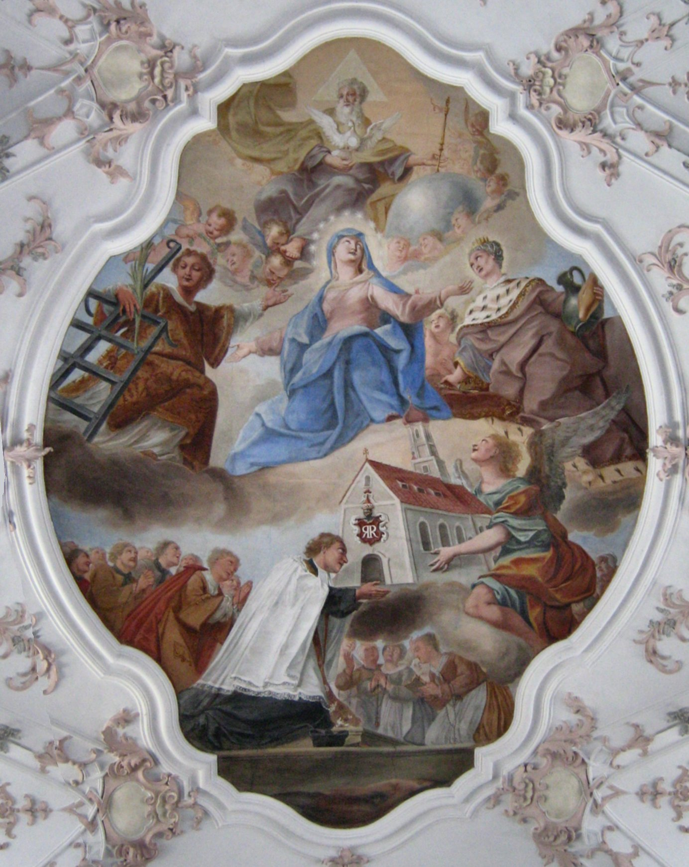 Chorfresko in der Pfarrkirche St. Laurentius und Elisabeth in Aulzhausen (Bayern)